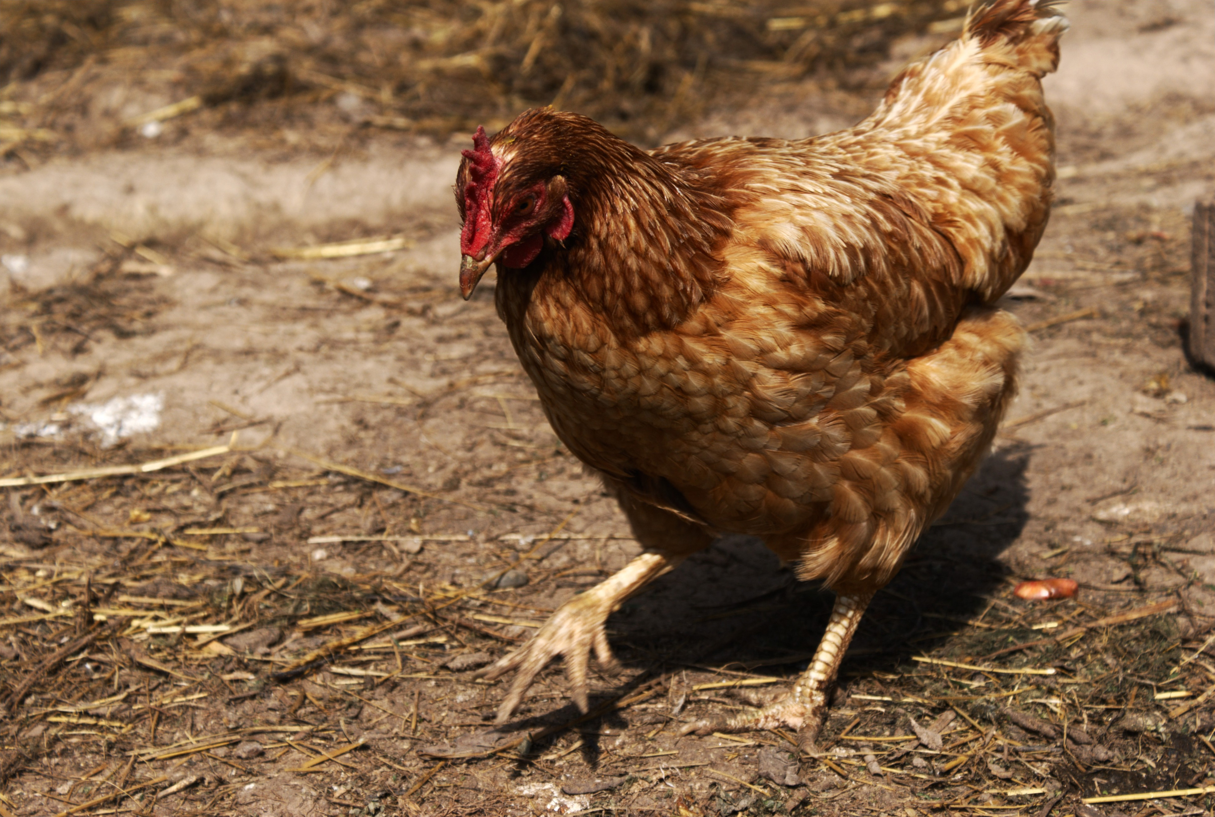 Взрослая курица породы Ломанн Браун бродит по двору в поисках подножного корма.